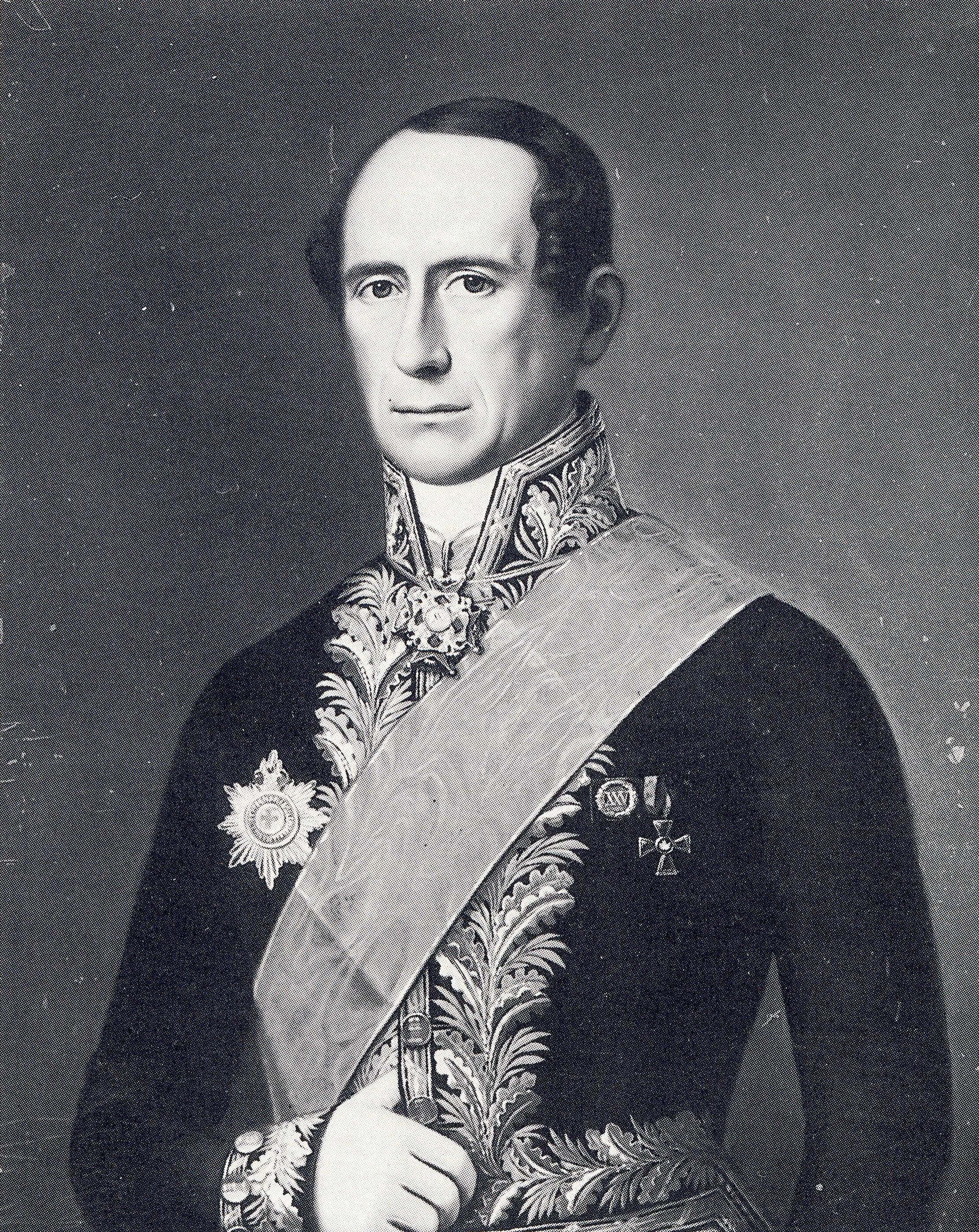 Finnish: Hovioikeuden presidentti ja tiedemies Carl Gustaf Mannerheim (1797–1854).title QS:P1476,fi:"Hovioikeuden presidentti ja tiedemies Carl Gustaf Mannerheim (1797–1854)." label QS:Lfi,"Hovioikeuden presidentti ja tiedemies Carl Gustaf Mannerheim (1797–1854)."